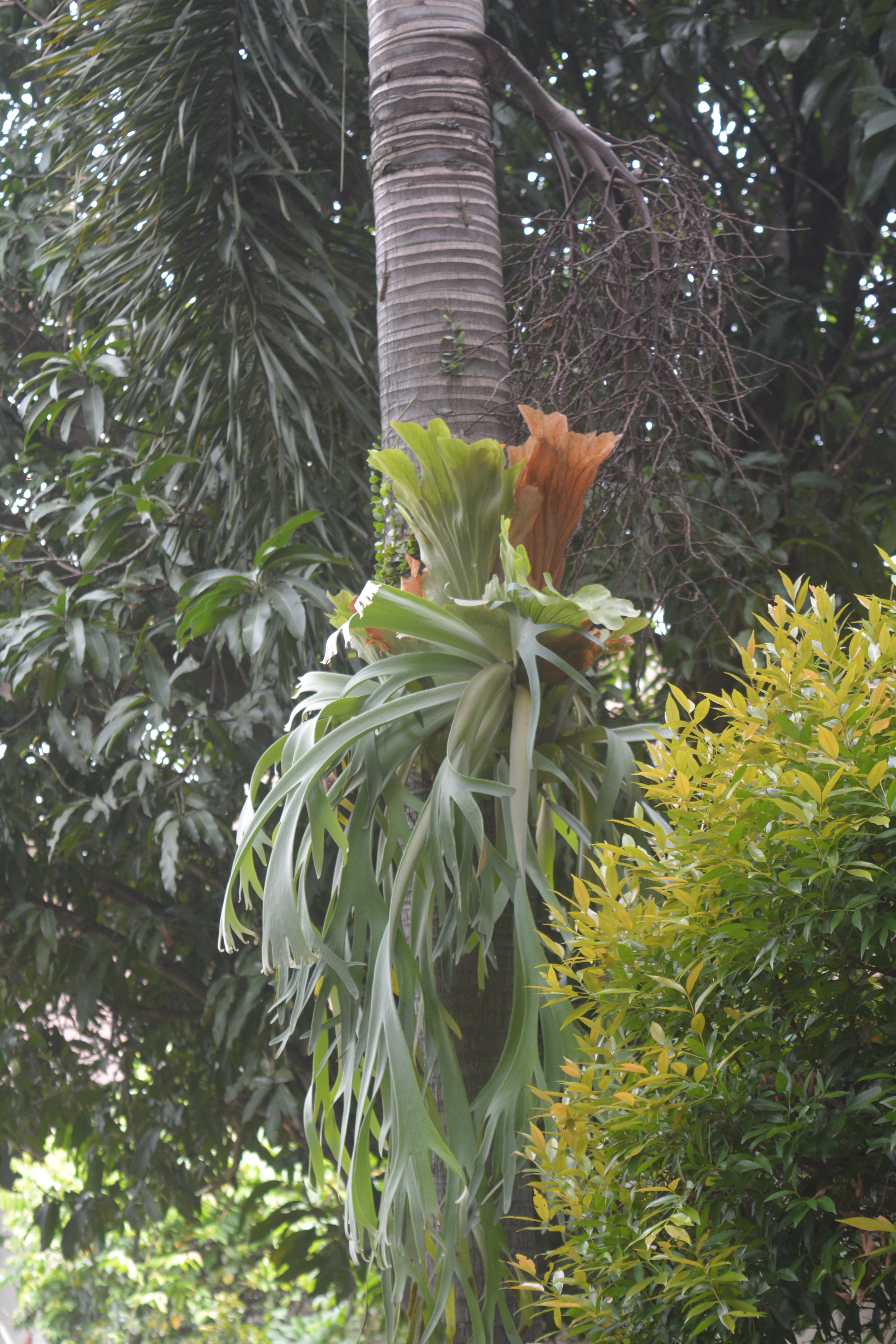 Tanduk Rusa merupakan tanaman paku yang ada pada jenis paku sejati. Biasanya tanaman ini menempel di pohon lain yang dijadikan sumber makanannya